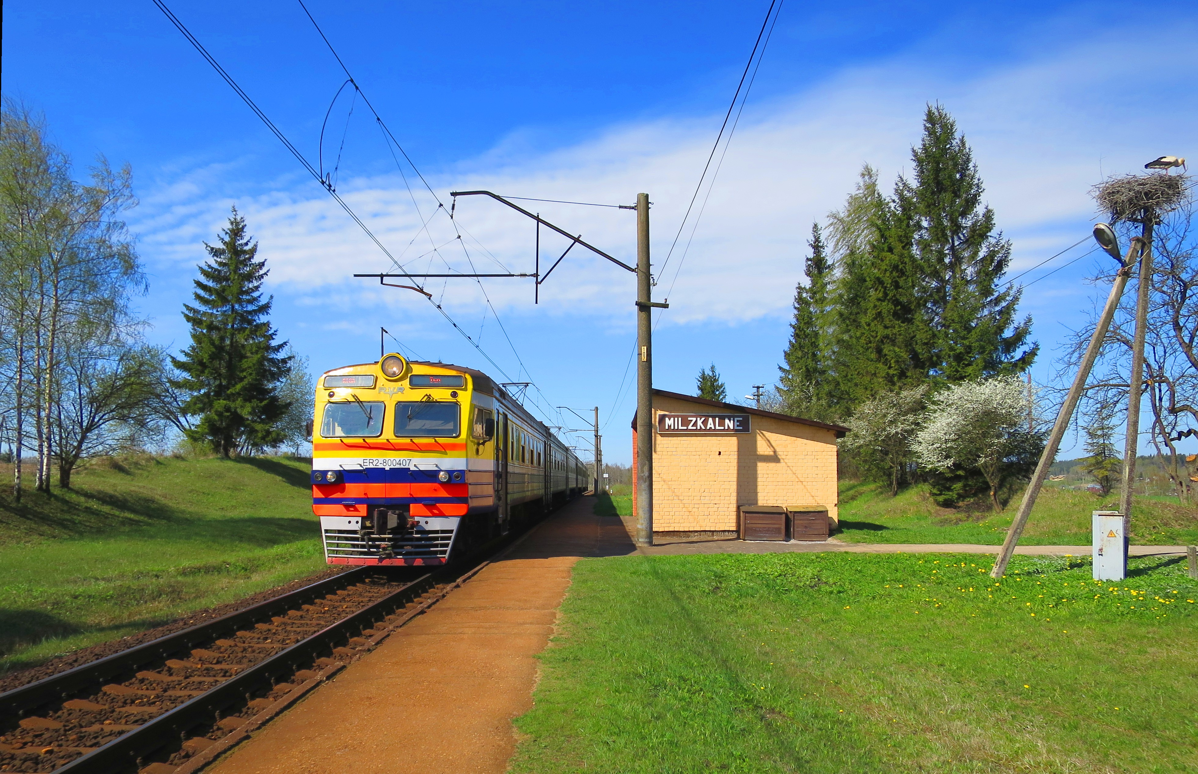 Vilciens uz Rīgu pienāk Milzkalnē